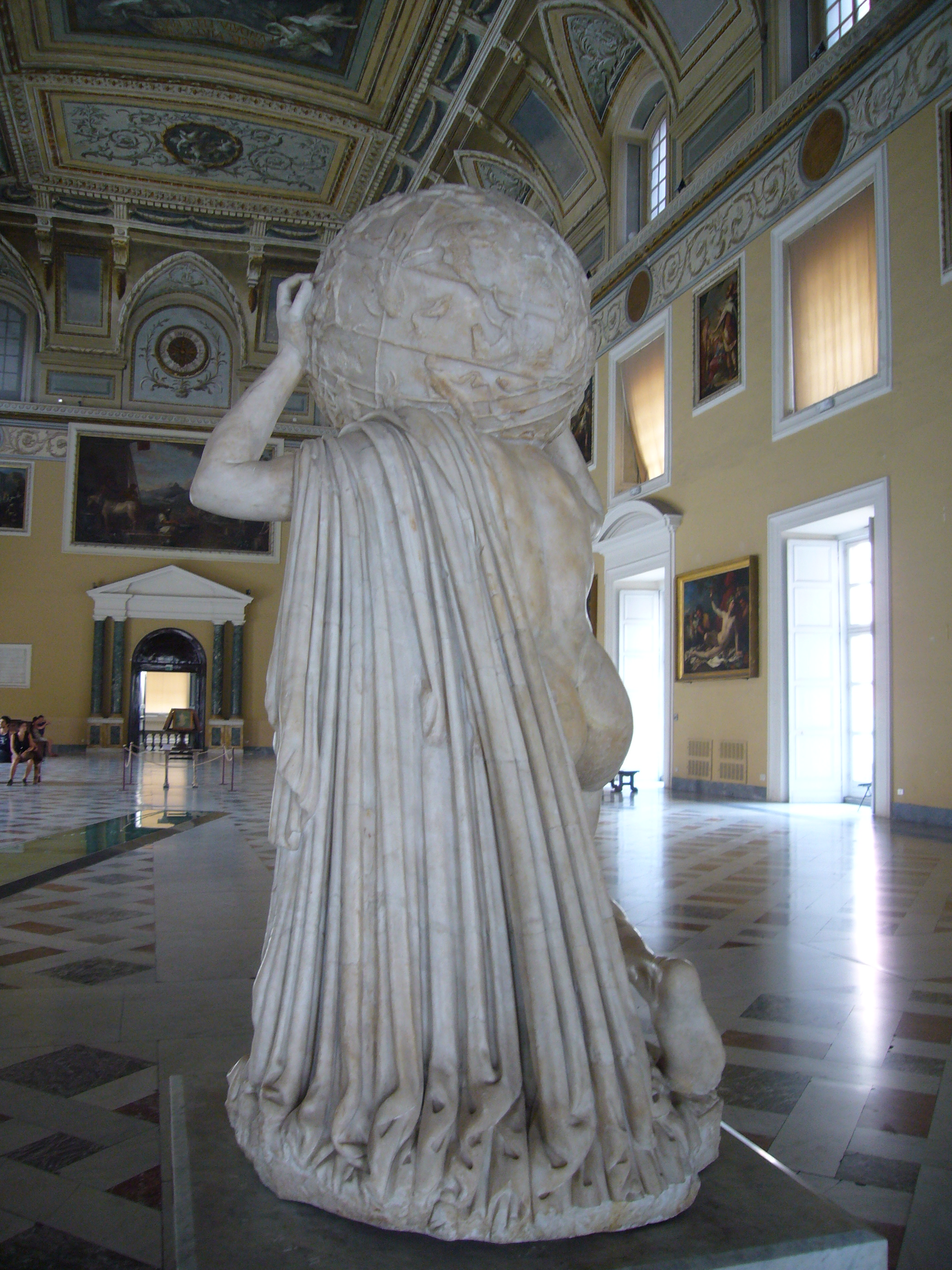 Retro della statua romana di Atlante (sec II d.C.) (già nella Collezione Farnese), oggi al Museo Archeologico Nazionale di Napoli, nel salone della Meridiana.